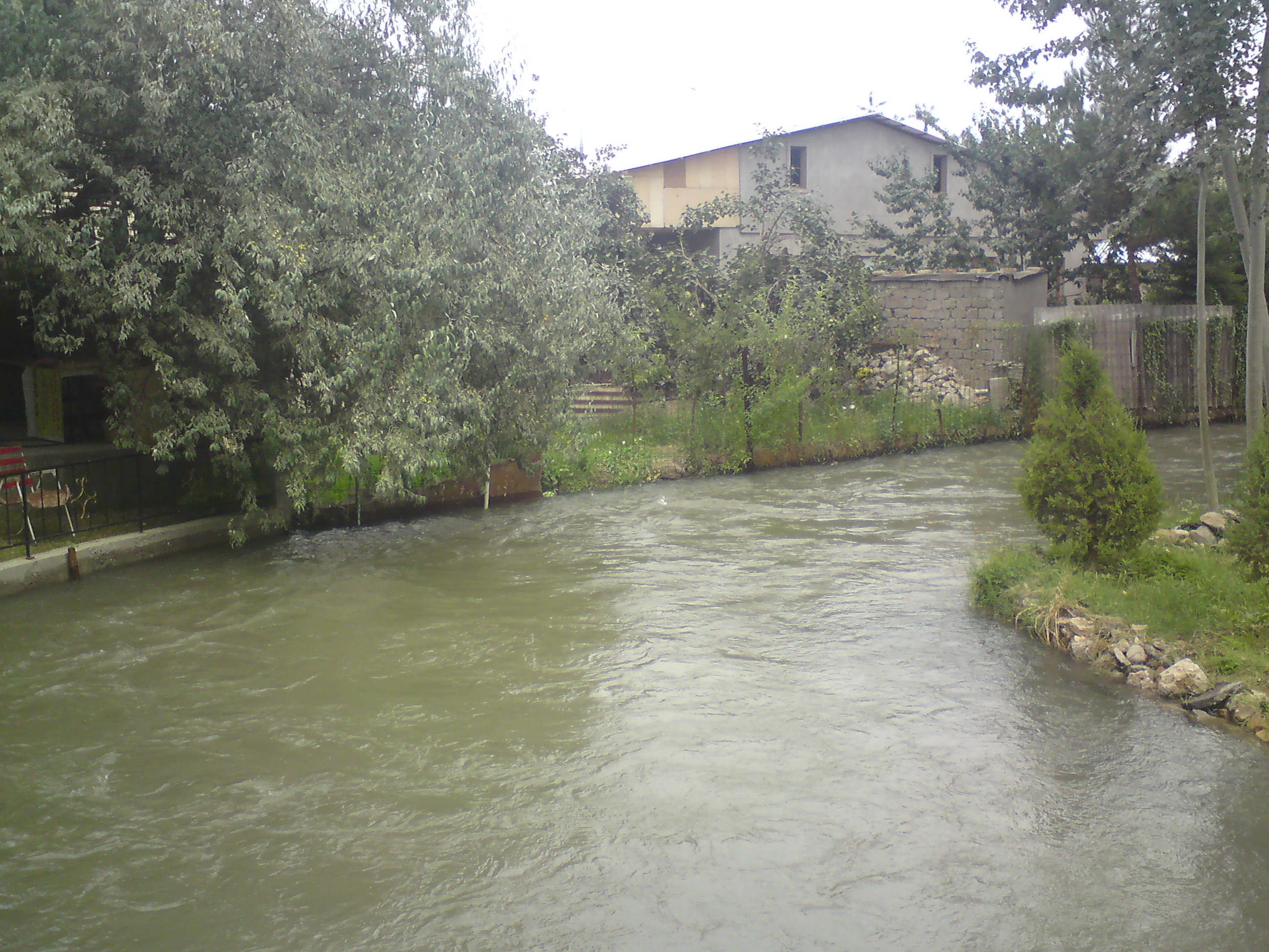 Канал Карасу (Правобережный), город Ташкент, близ улицы Дурмой Йули